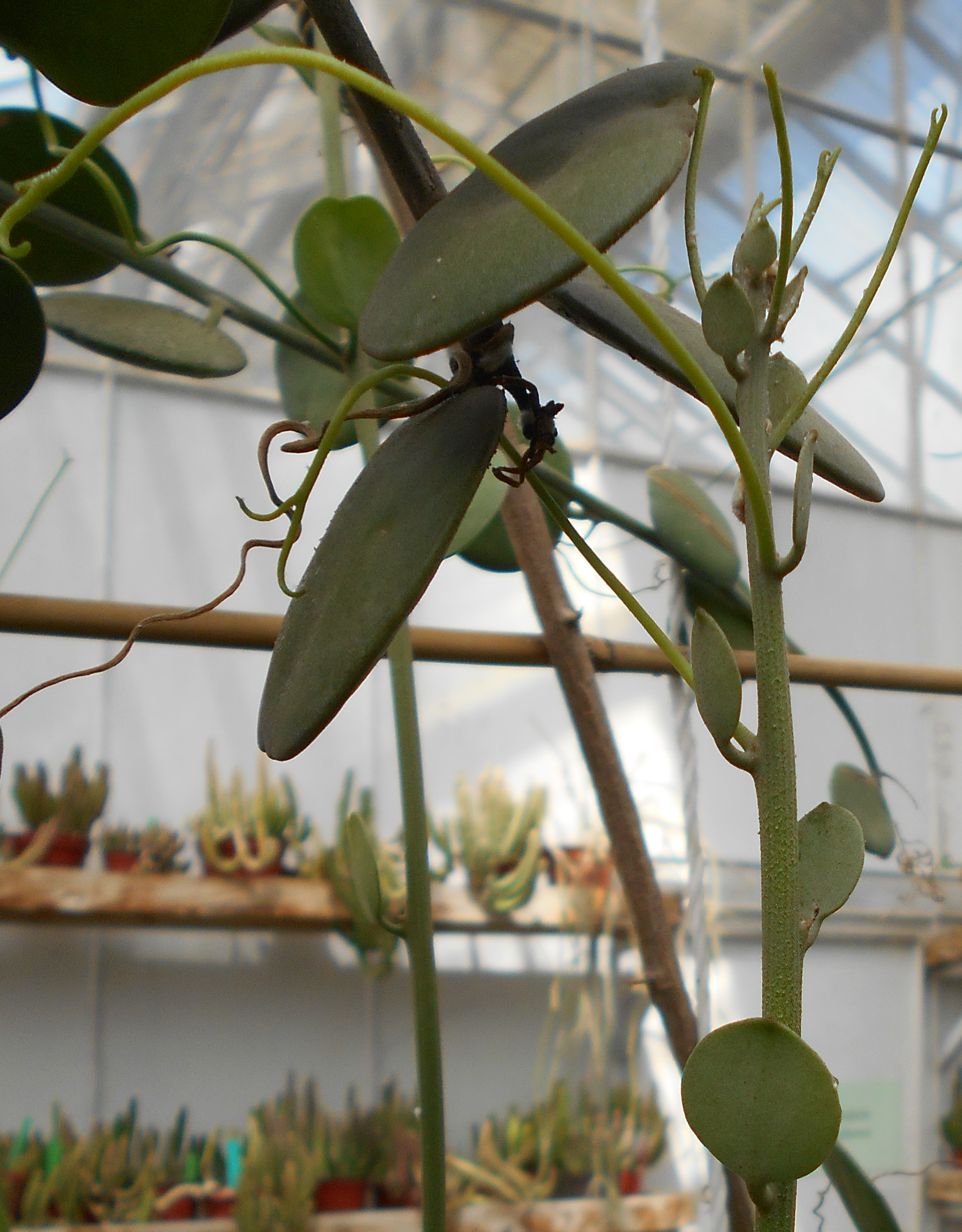 Xerosicyos danguyi, Ogród Botaniczny UMCS w Lublinie